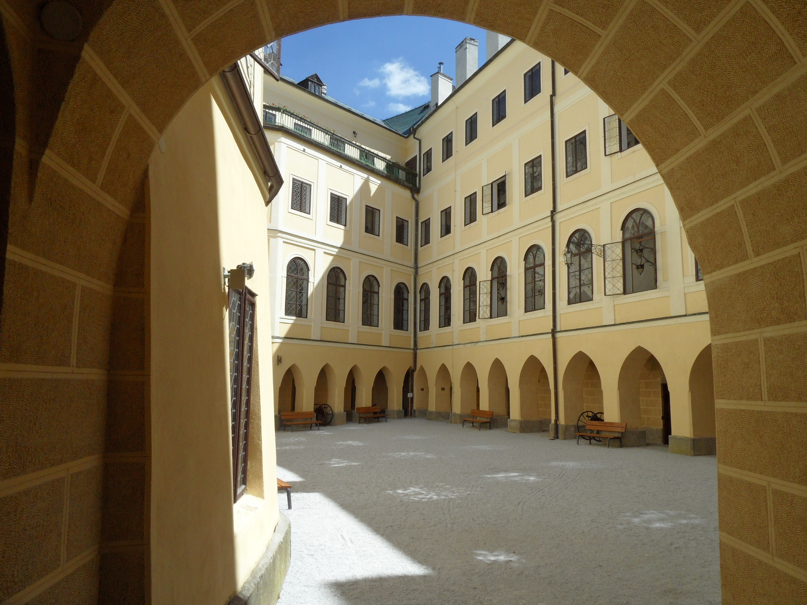 Zámek Orlík, Orlík nad Vltavou 112, Orlík nad Vltavou.